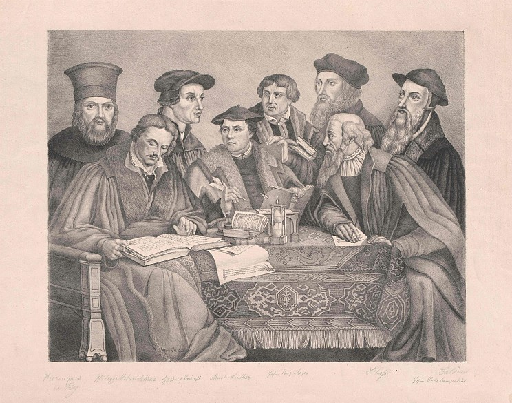 Gruppenbild von acht Religionsreformatoren, historisierende Grafik, 19. Jahrhundert